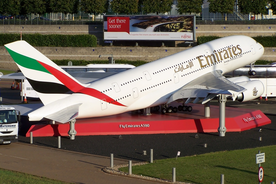 Emirates A380 Model